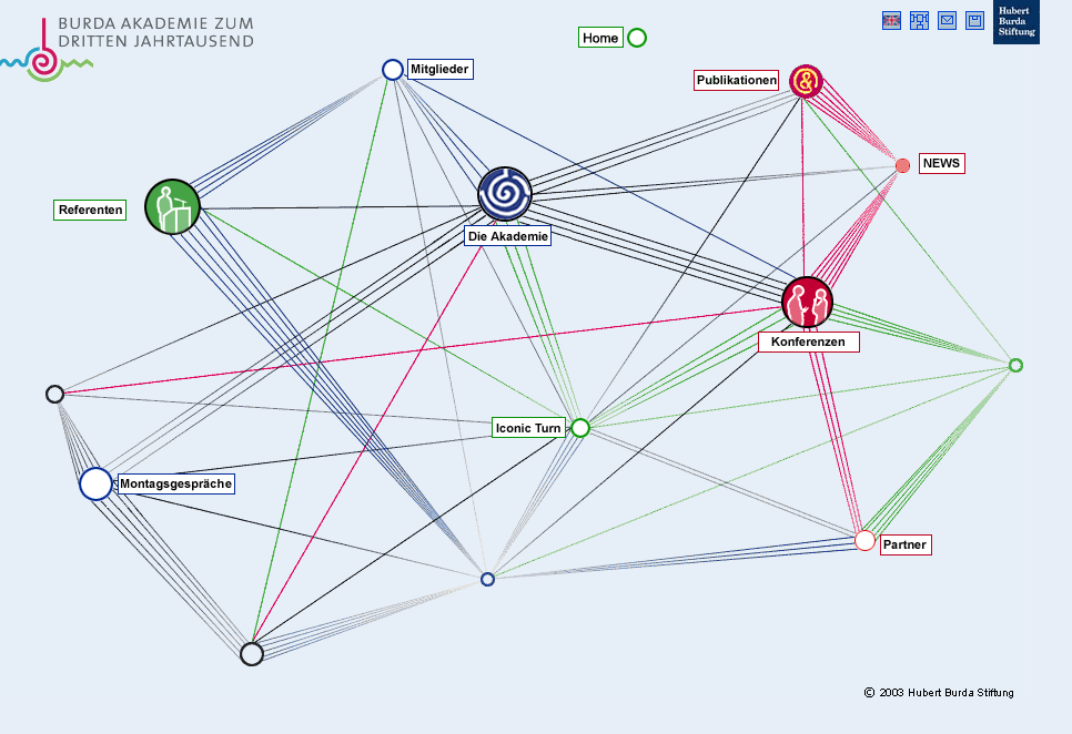 Grafische Darstellung der Akademie zum dritten Jahrtausend